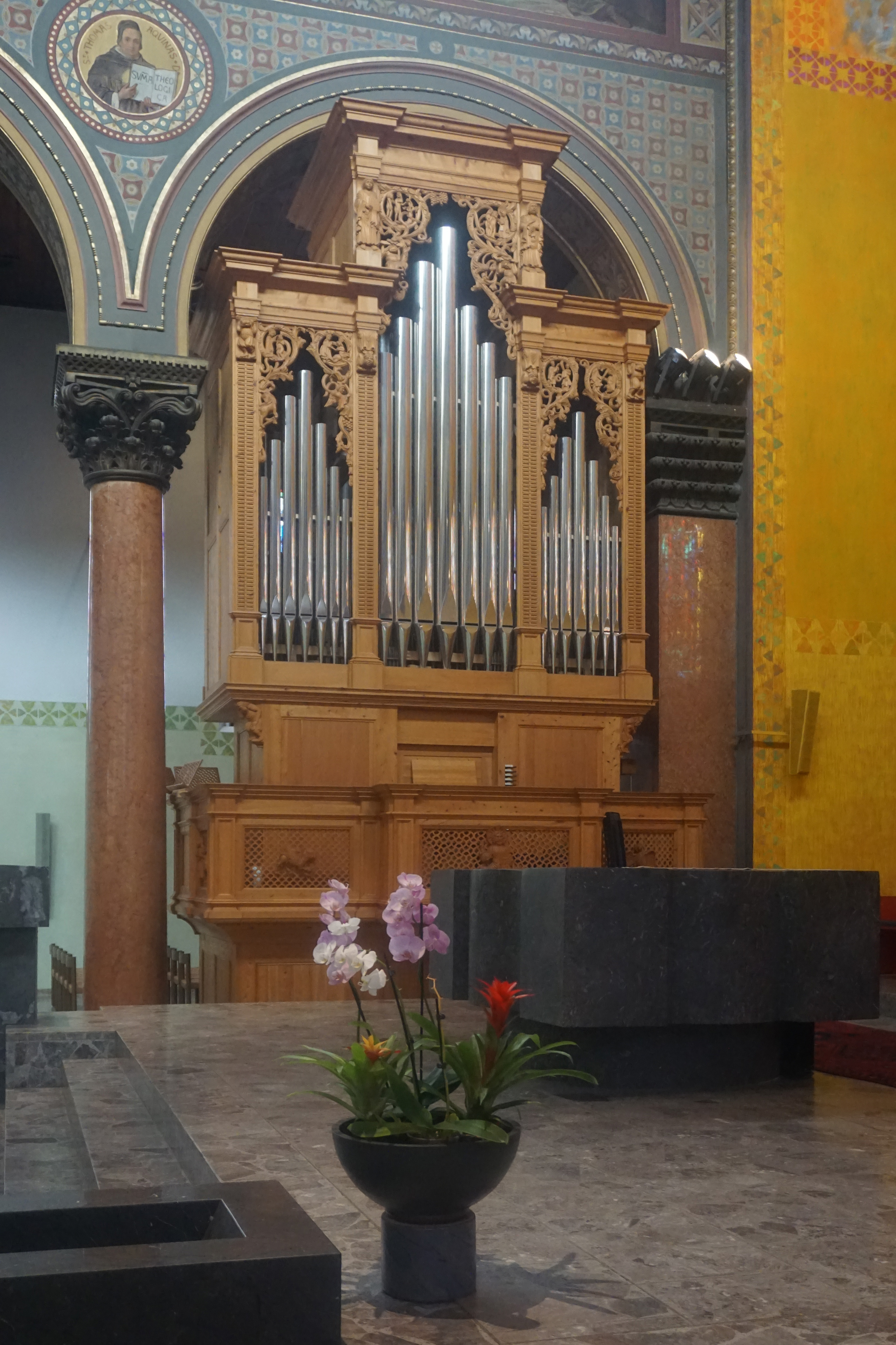 Dreifaltigkeitskirche in Bern, Chororgel und Altar